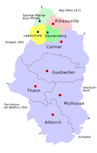 Arrondissement Ribeauvillé mit Verwaltungsgiederung und Lage im Département Haut-Rhin. Selbst erstellt von Benutzer: Jeanfrance Juni 2006